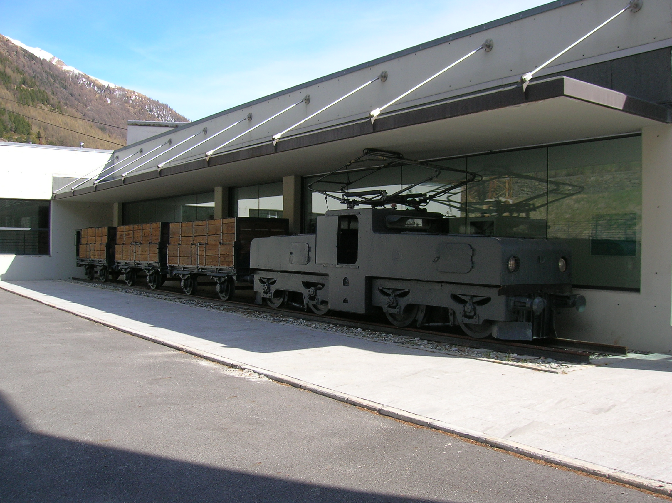 Trenino del Drinc, convoglio merci per il trasporto del materiale dalla miniera di Cogne alla teleferica di Acque Fredde. Ha cessato il servizio alla fine degli anni '70. Oggi è esposto al Museo minerario di Cogne, Valle d'Aosta, Italia.